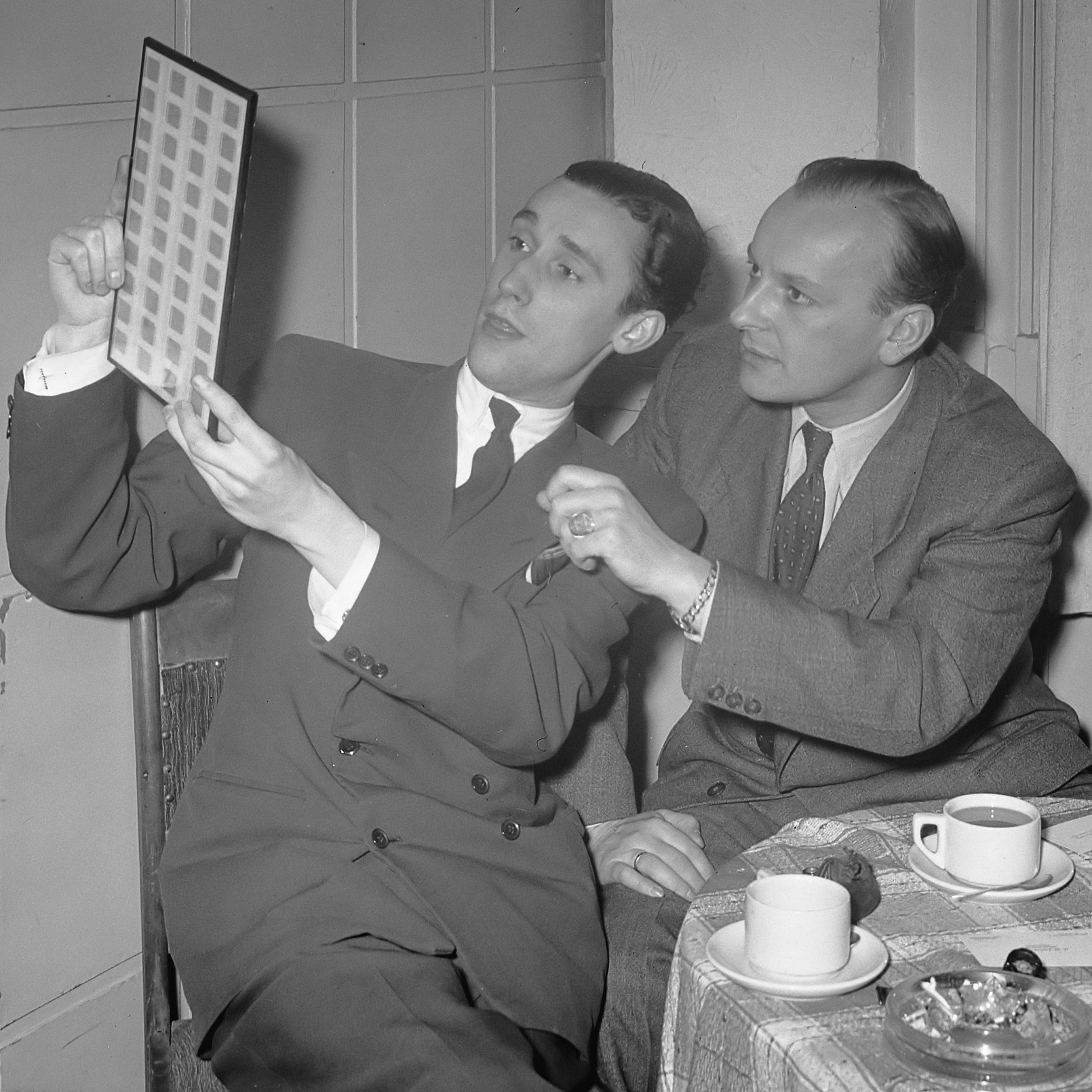 H.W. Kolm Veltee (Oostenrijkse filmregisseur) rechts en links Paul Huf 14 maart 1951